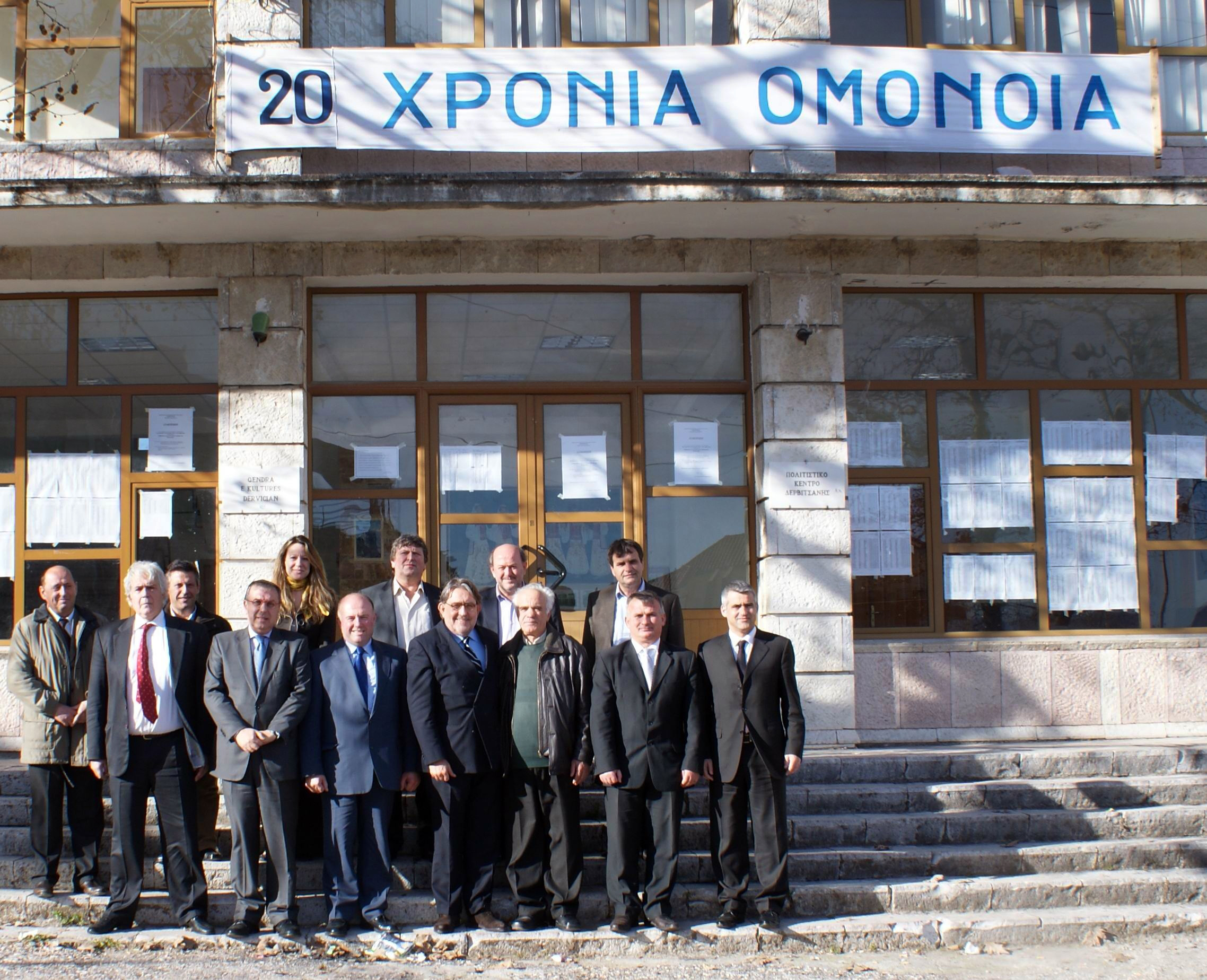 Την Κυριακή 16 Ιανουαρίου 2011 ο Υφυπουργός Εξωτερικών κ. Δημήτρης Δόλλης μετέβη στη Δερβιτσάνη Αργυροκάστρου ως εκπρόσωπος της Ελληνικής Κυβέρνησης και συμμετείχε στους εορτασμούς για τη συμπλήρωση είκοσι ετών από την Ίδρυση της Οργάνωσης της Ελληνικής Εθνικής Μειονότητας ΟΜΟΝΟΙΑ στην Αλβανία